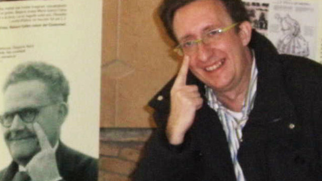 Imatge pròpia d'en Víctor Pàmies durant la conferència "Els refranys a través de Joan Amades", que va tenir lloc a Can Figarot, de Vilafranca del Penedès, el dia 28 de setembre del 2009.